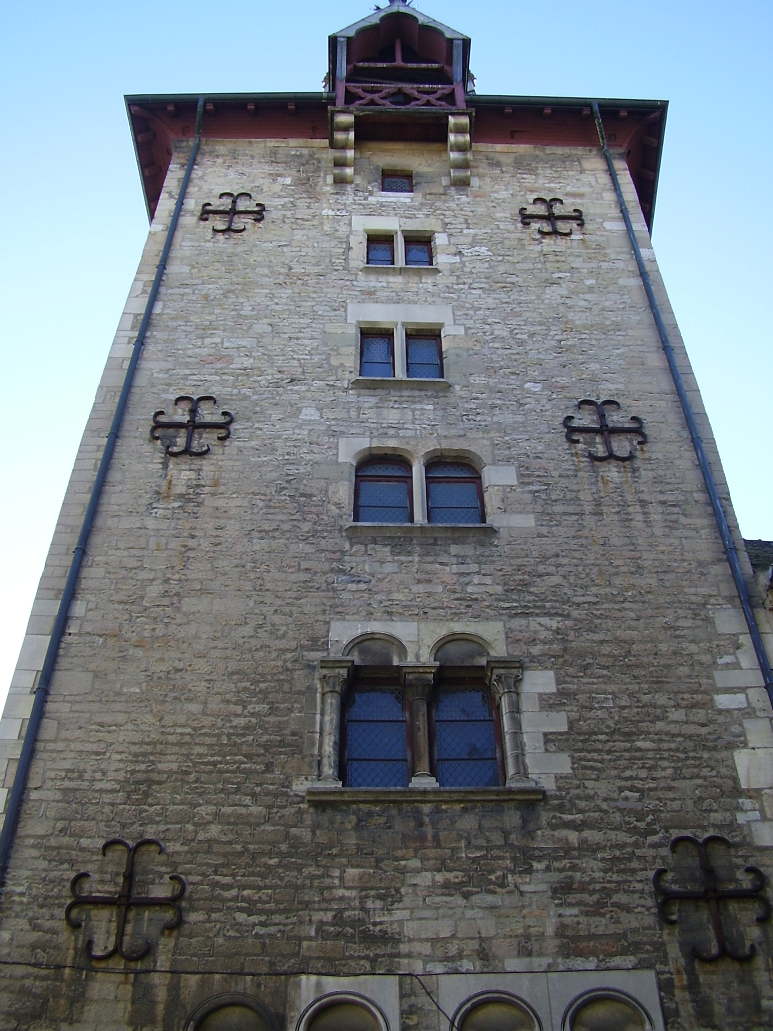 Beffroi de Beaune (France)